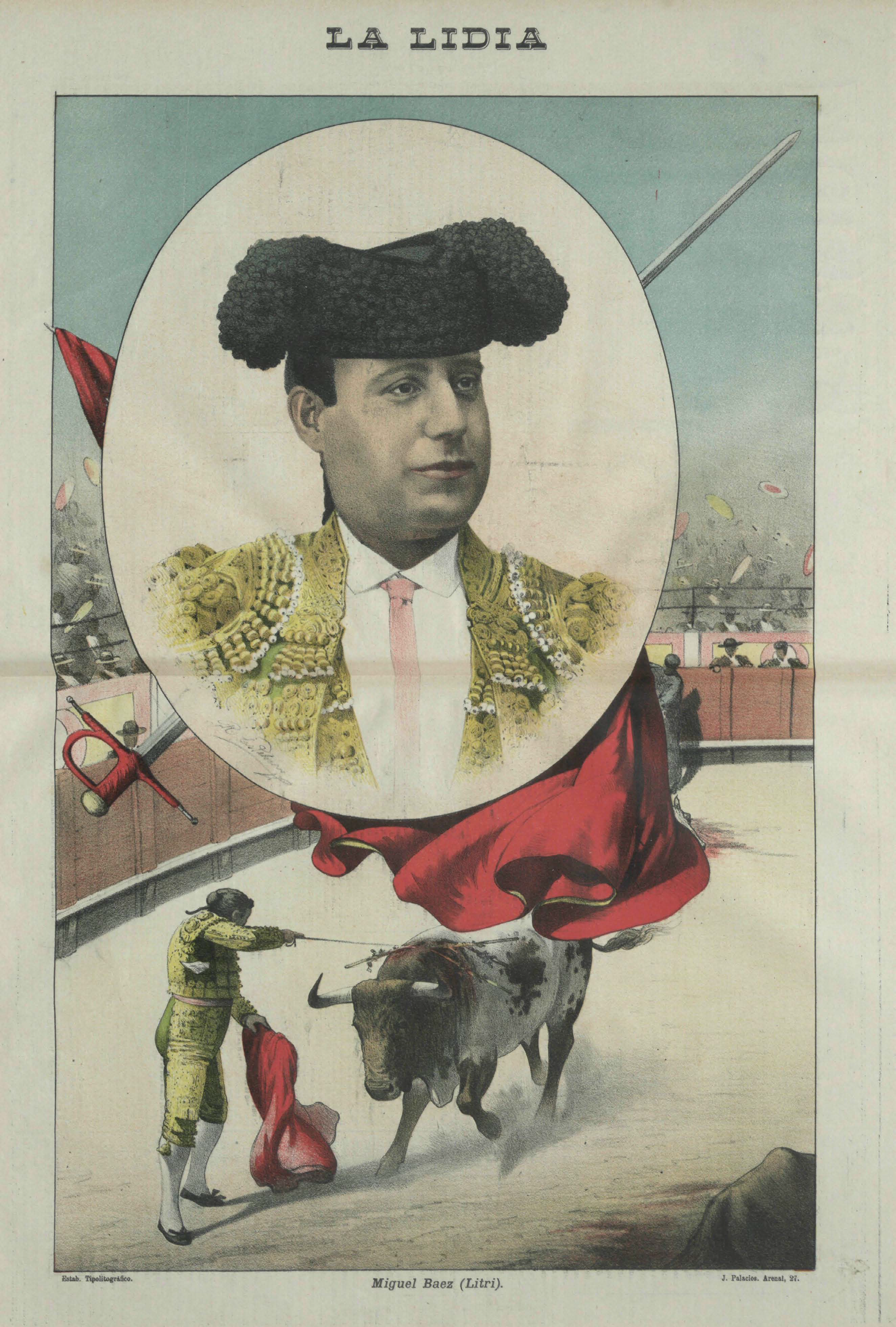 Miguel Baez, Litri. Litografía por dibujo de Ricardo Esteban, La Lidia, Madrid, 14 de agosto de 1899